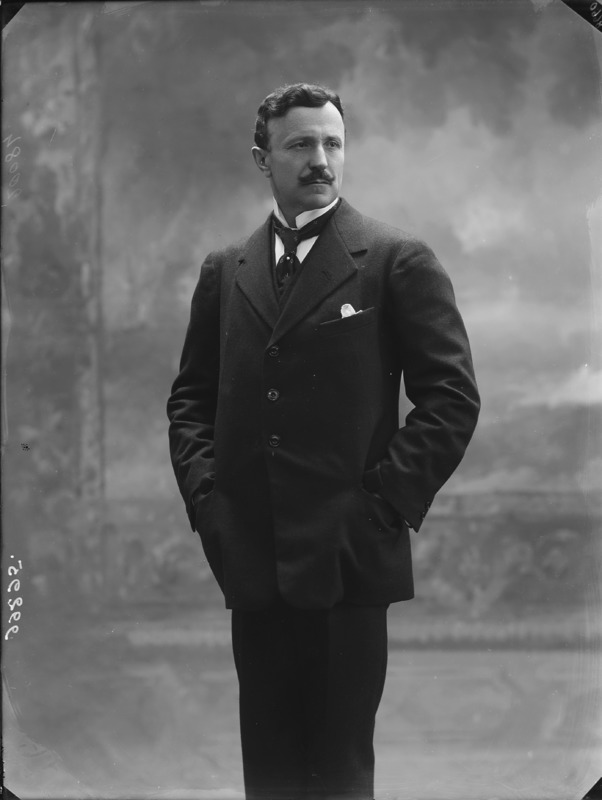 tenore Edoardo Garbin